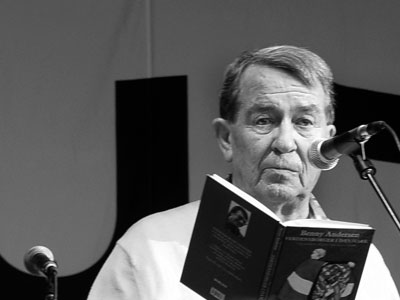 Benny Andersen læser op i Aarhus 2009